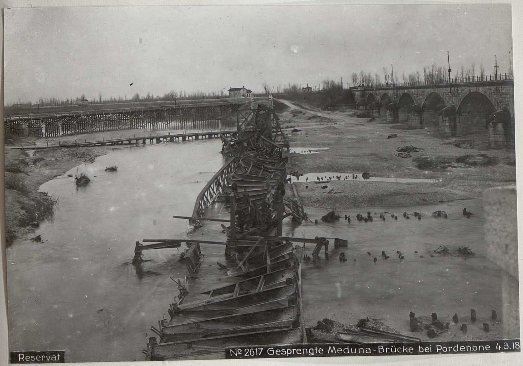 Gesprengte Meduna-Brücke bei Pordenone 4.3.18.